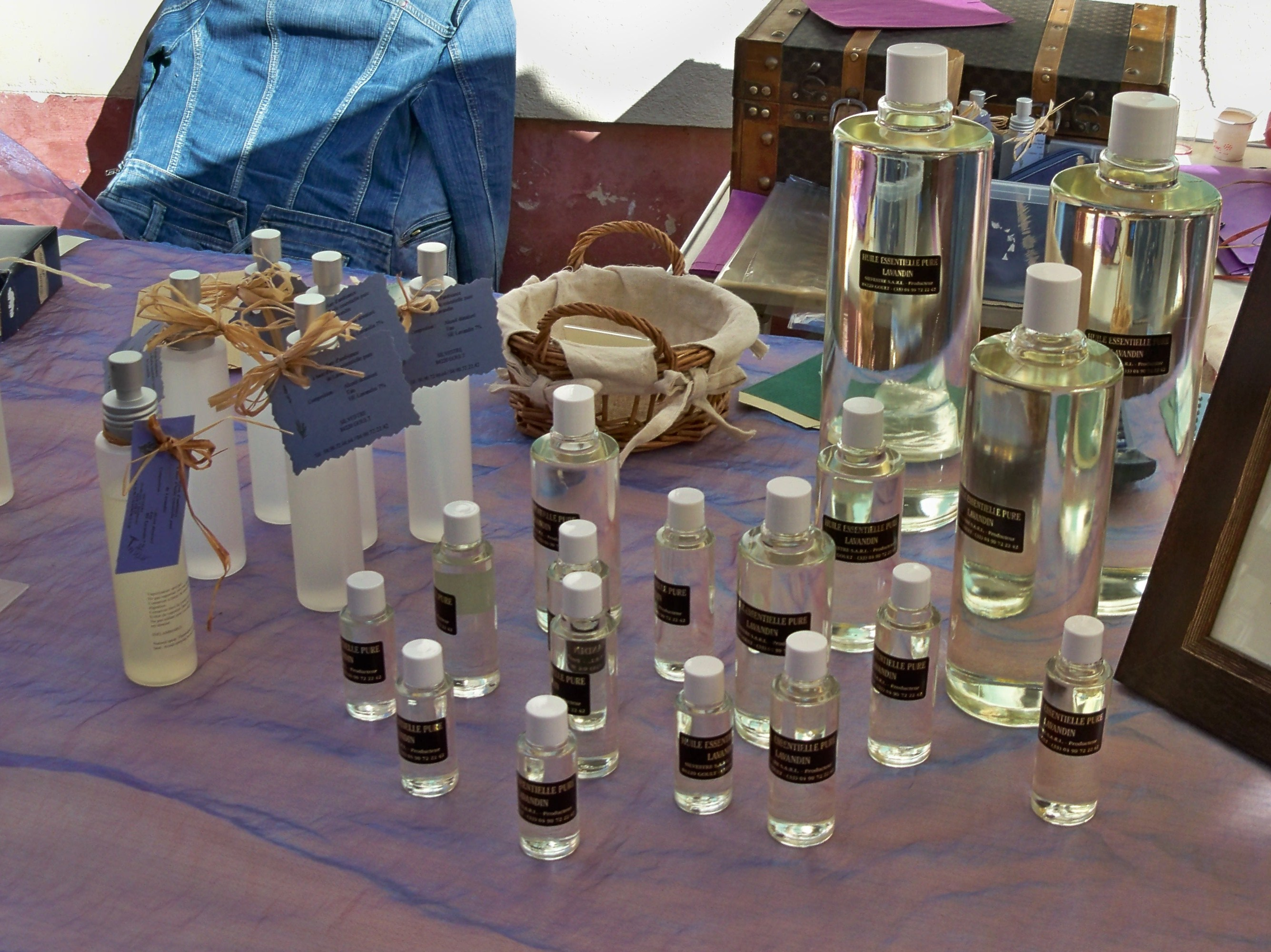 Huiles essentielles de Lavandin sur le marché de Goult (84)